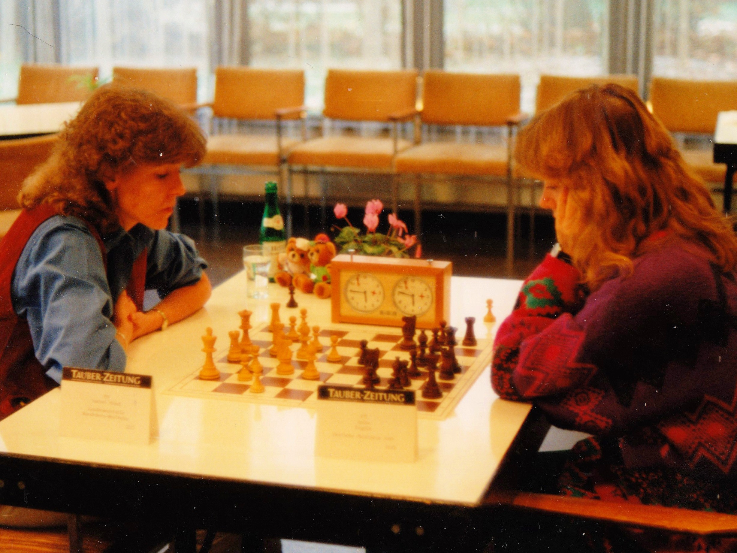 Isabel Hund - Anke Koglin, Finalgruppe der Deutschen Damenmeisterschaft, November 1993 in Bad Mergentheim.